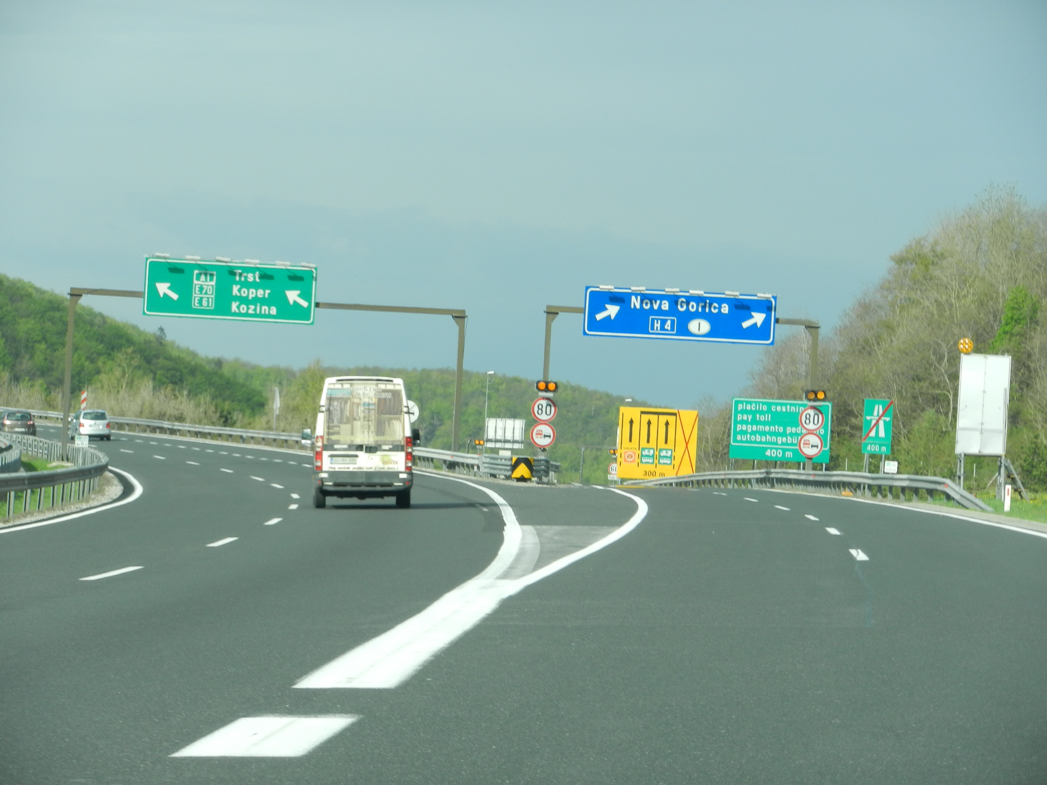 Različna prometna signalizacija na avtocesti